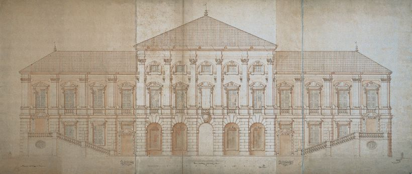 Fassade des Gartenpalais Liechtenstein in der Rossau, Wien.